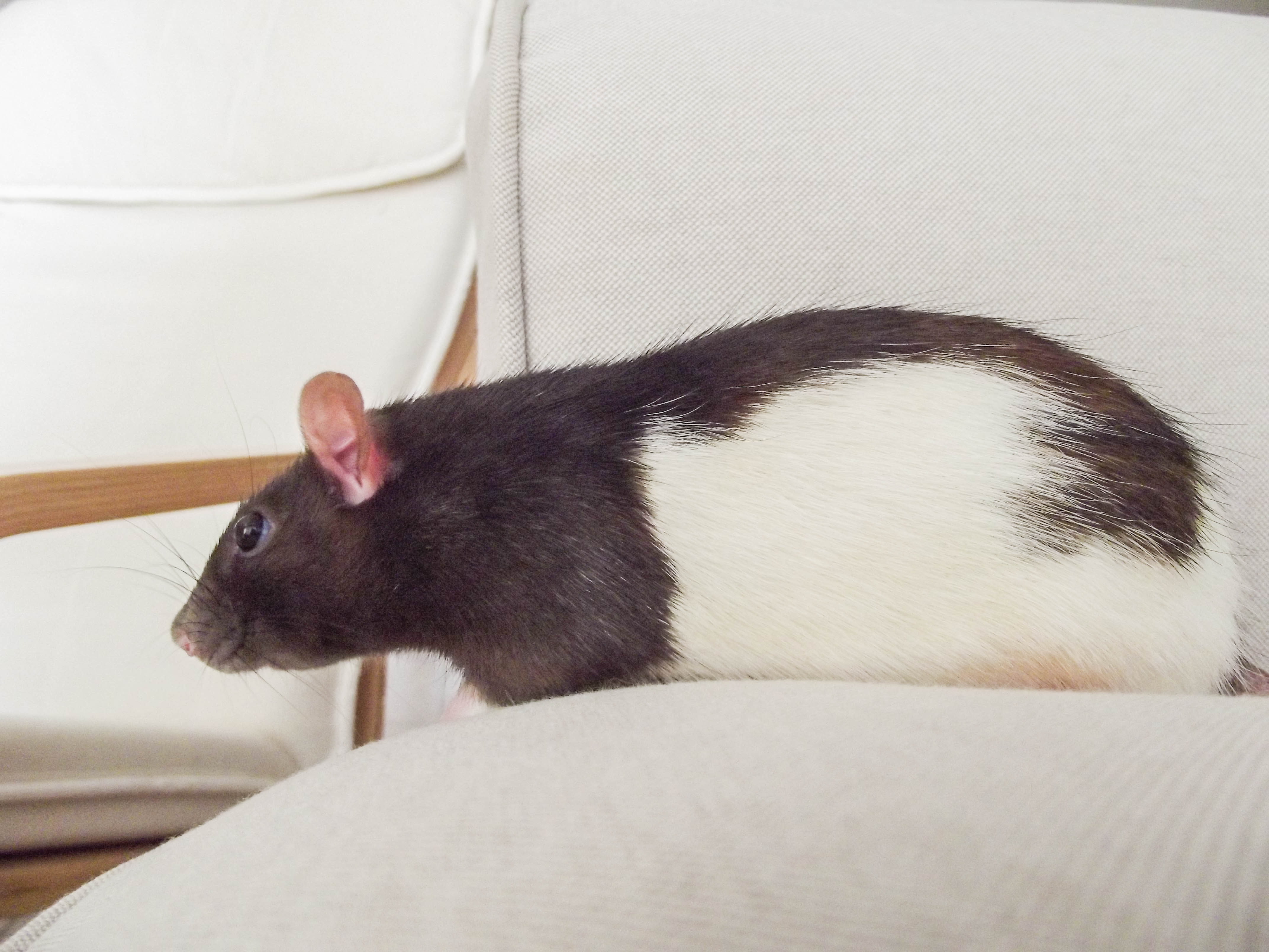 Belinda the beautiful rat